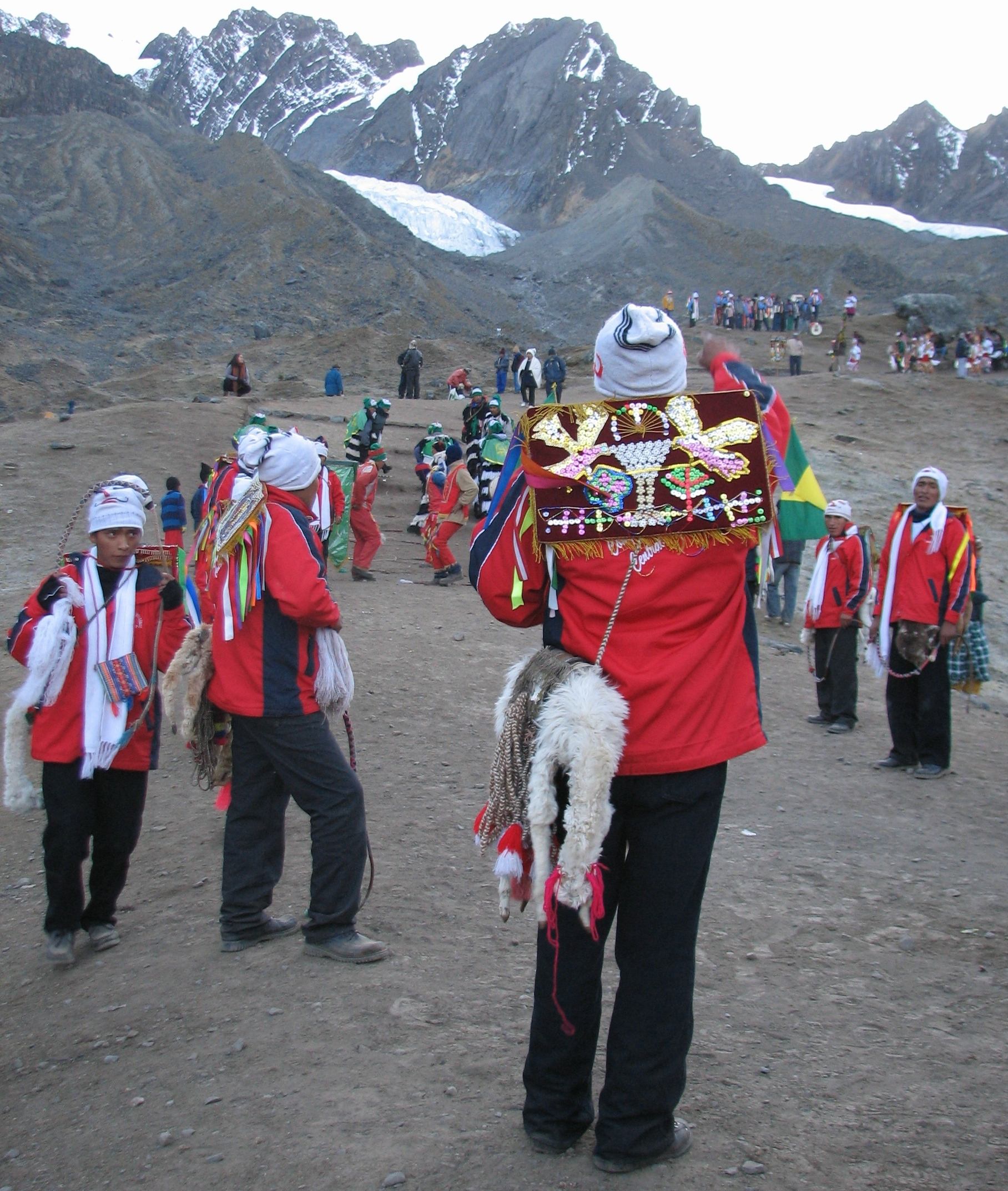 Qoyllur_Rit'i: Festival señor de Qoyllur Rit'i, dancers